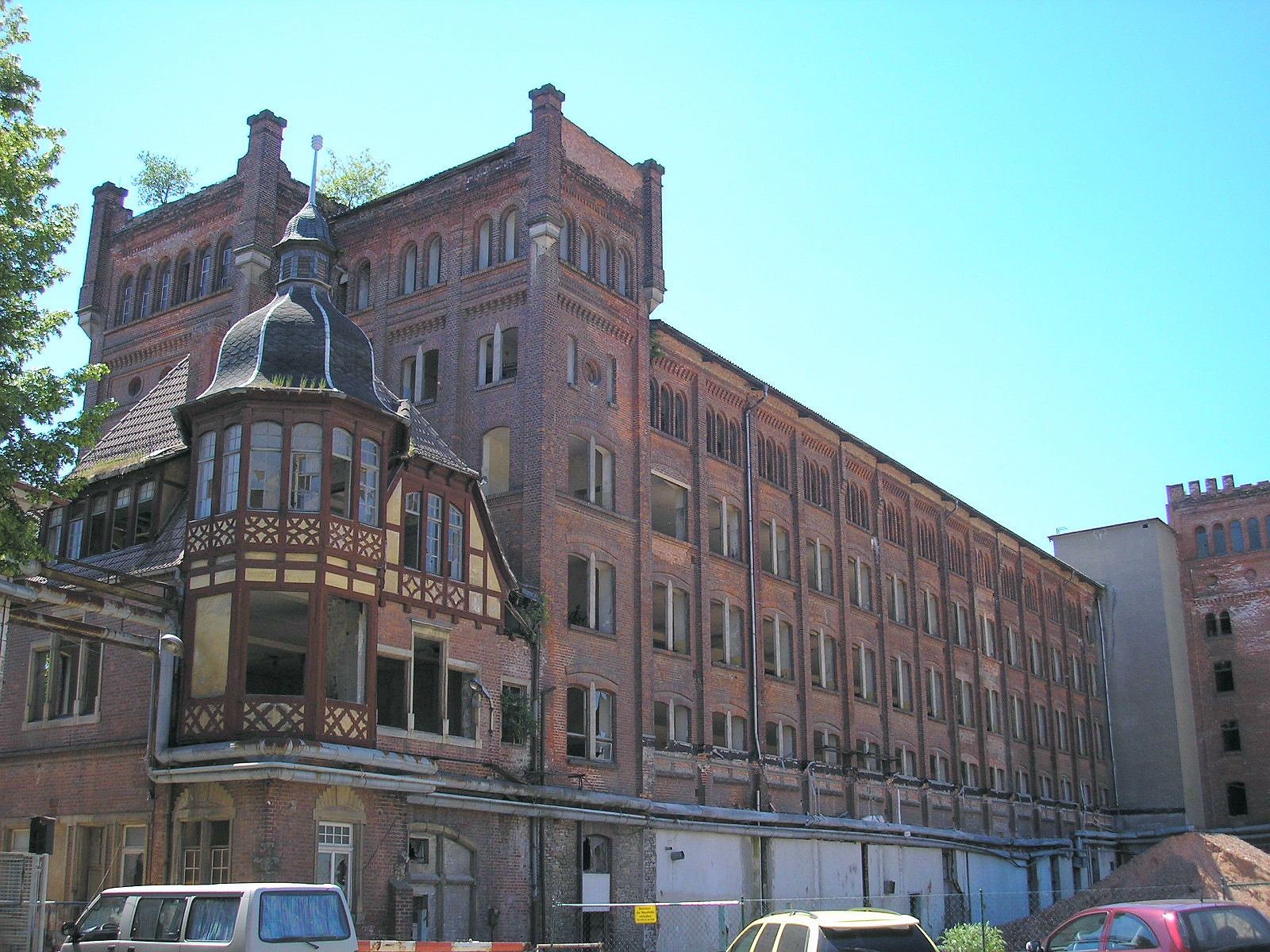 Ein altes Fabrikgebäude in Pößneck (Thüringen), kurz vor dem Abriss.